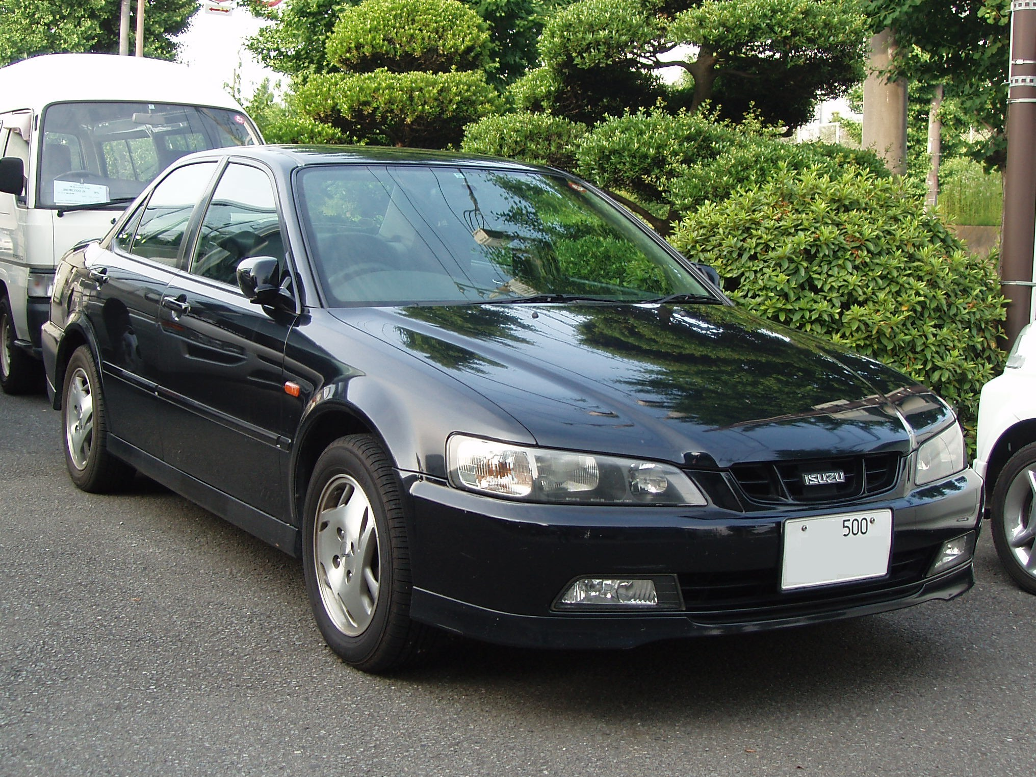 ISUZU ASKA - generation 4